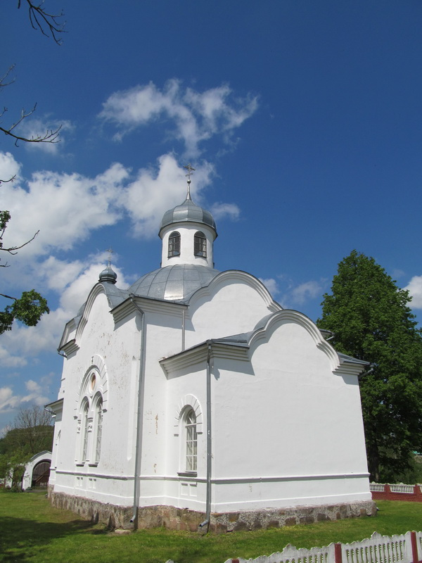 Люшнева. Царква